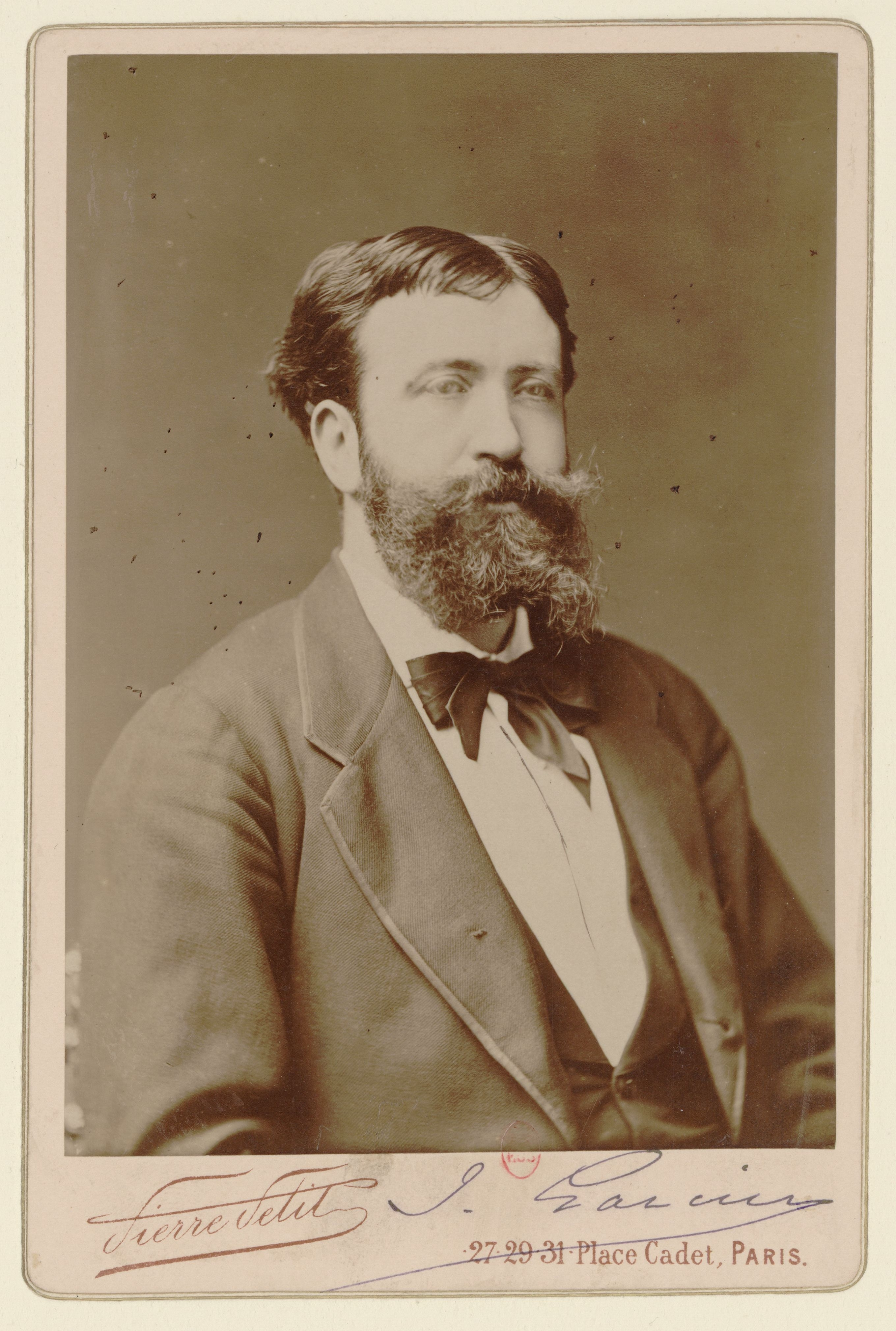 Jules Garcin / Pierre Petit